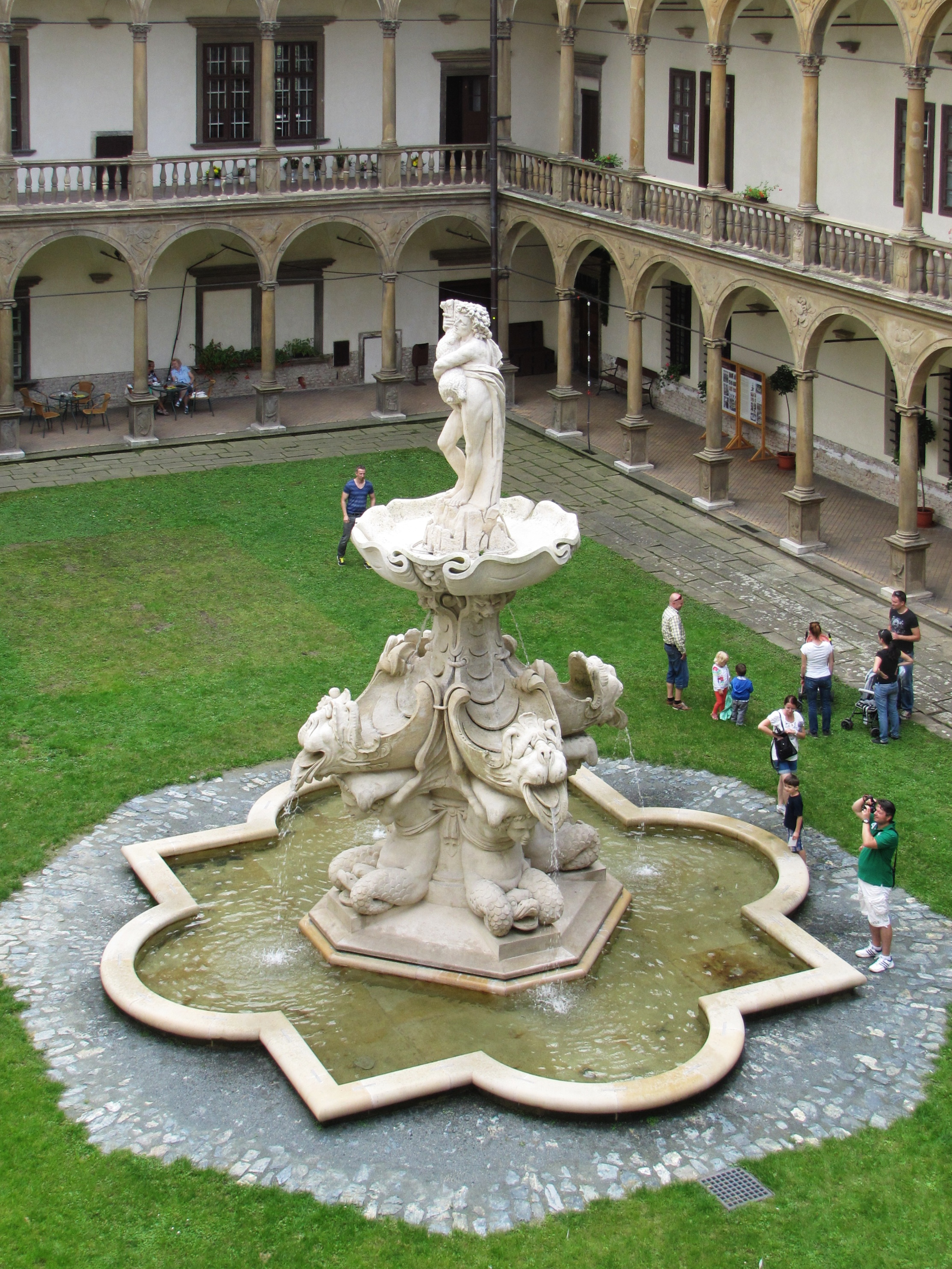 Bakchova kašna na nádvoří zámku v Bučovicích z roku 1637 - pohled z druhého patra zámku